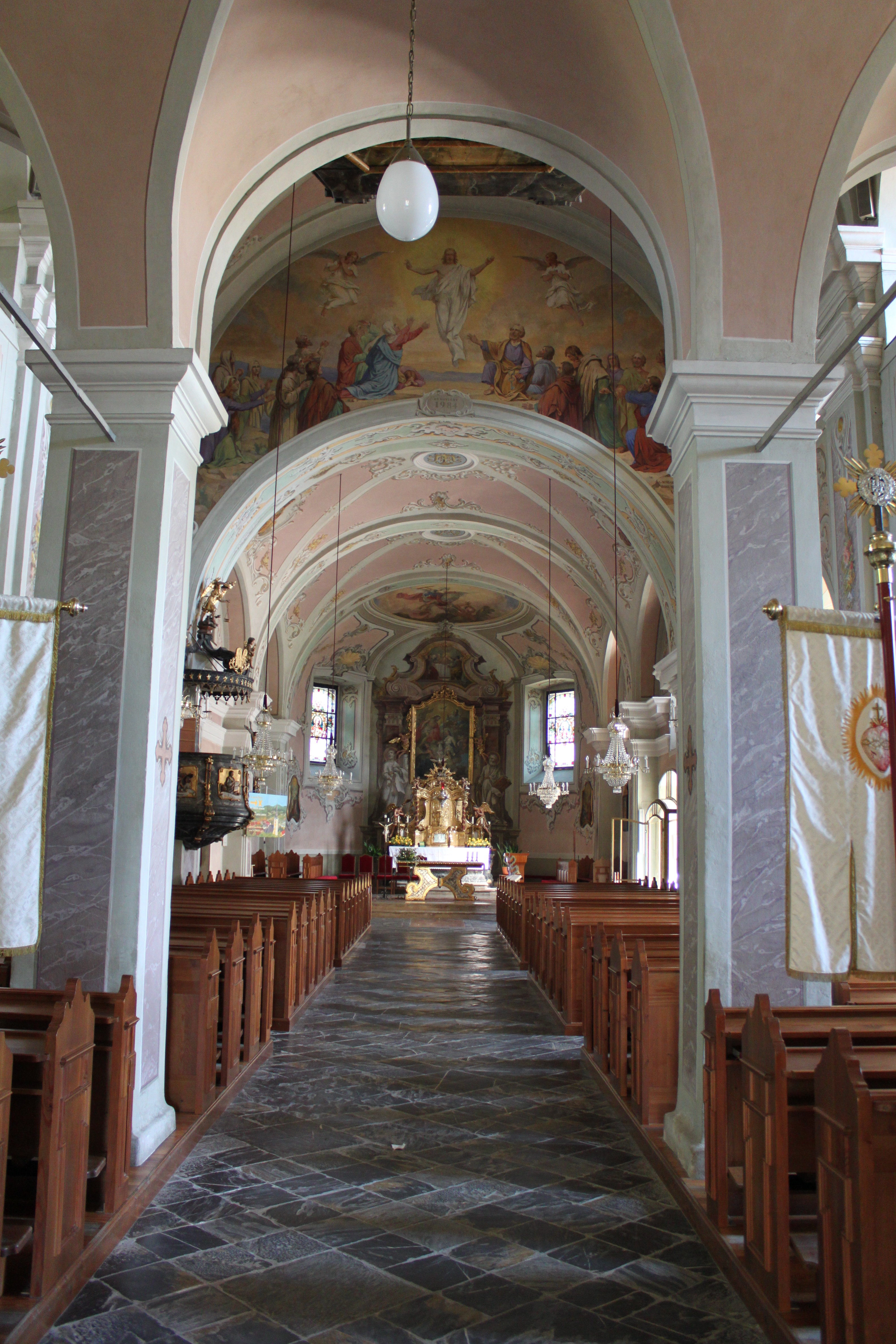 Veitskirche (Passail), Blick zum Chor